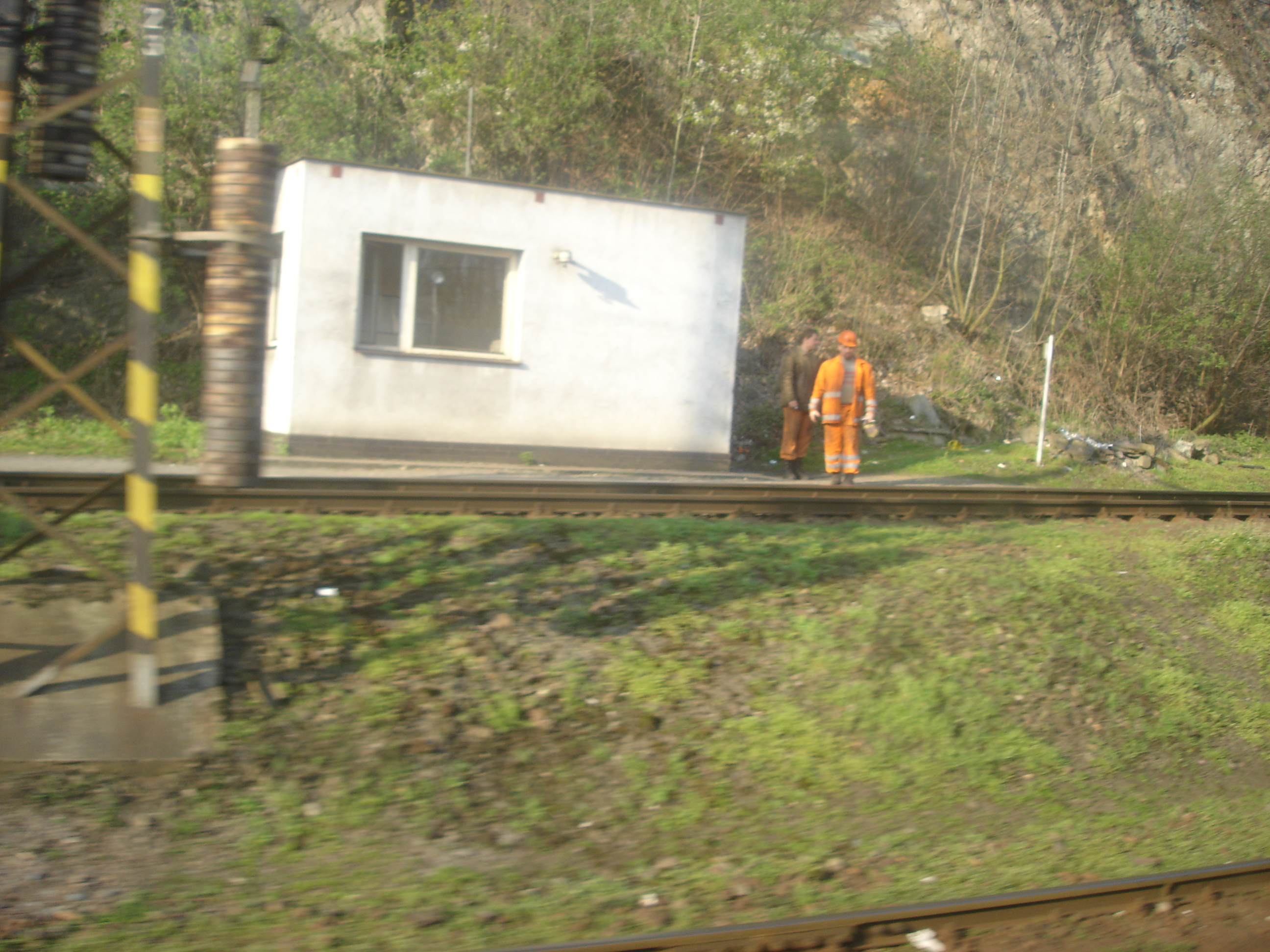 Svážný pahrbek v Kralupech nad Vltavou.. foto z vlaku by Mrkvo